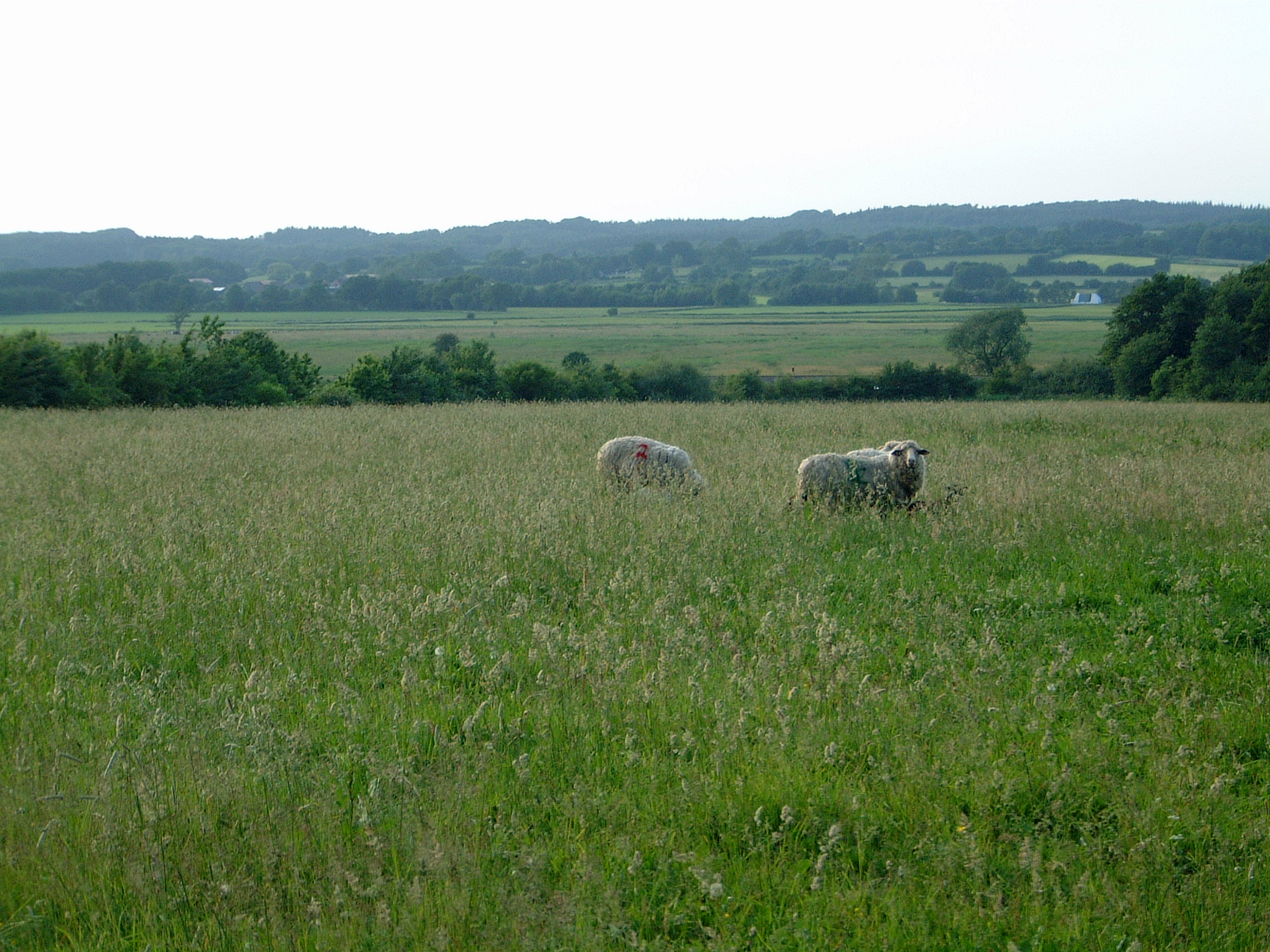 Blick in die Niederung der Buckener Au bei Aukrug-Homfeld